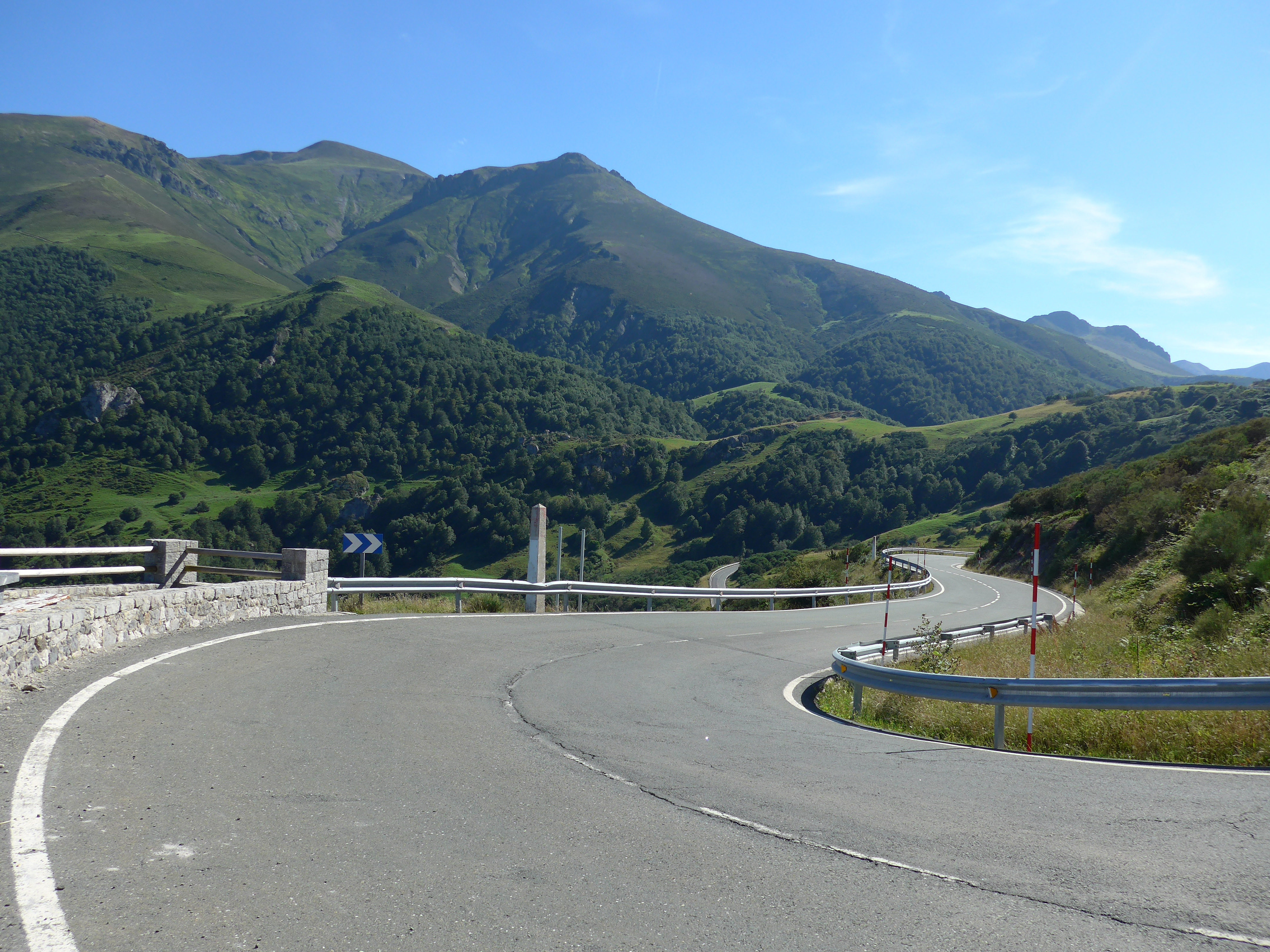 El puerto de San Glorio (1609 m) comunica las provincias de Cantabria y León a través de la Cordillera Cantábrica.